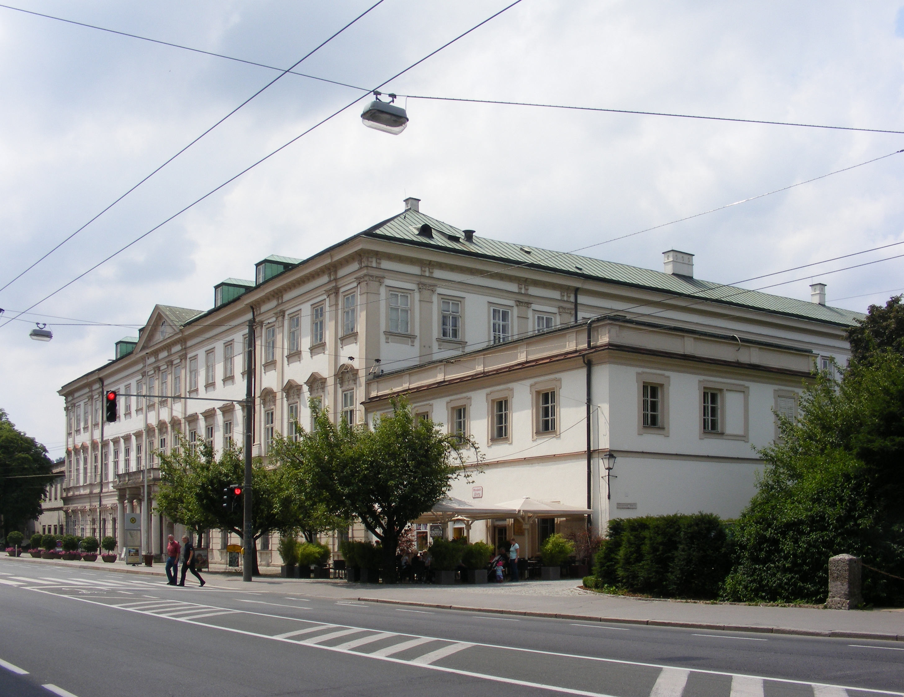 Schloss Mirabell, vom Mirabellplatz/Ecke Rainerstraße aus gesehen (Ostfassade)